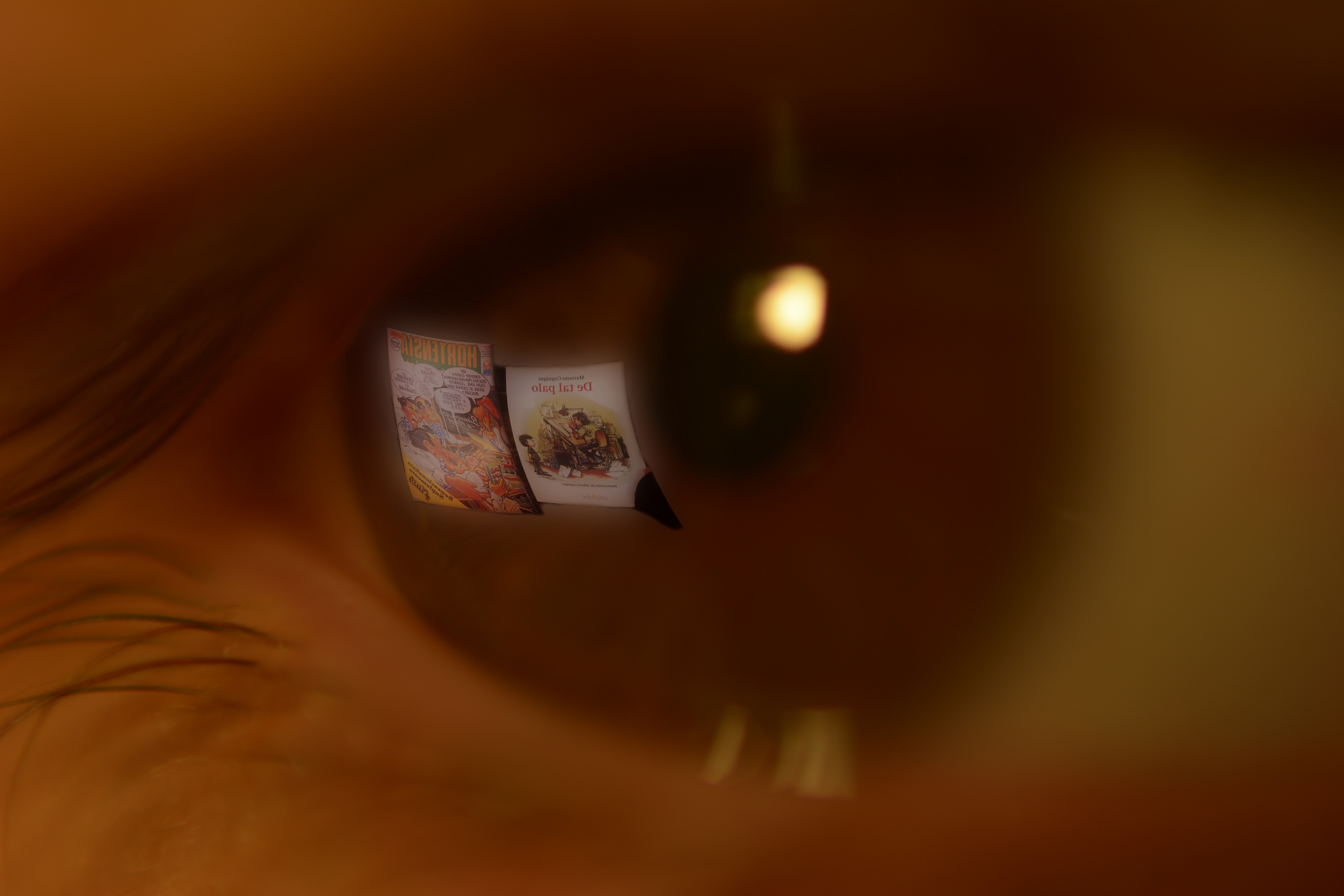 se puede ver de reflejo la revista Hortencia de Alberto Pío Augusto Cognigni